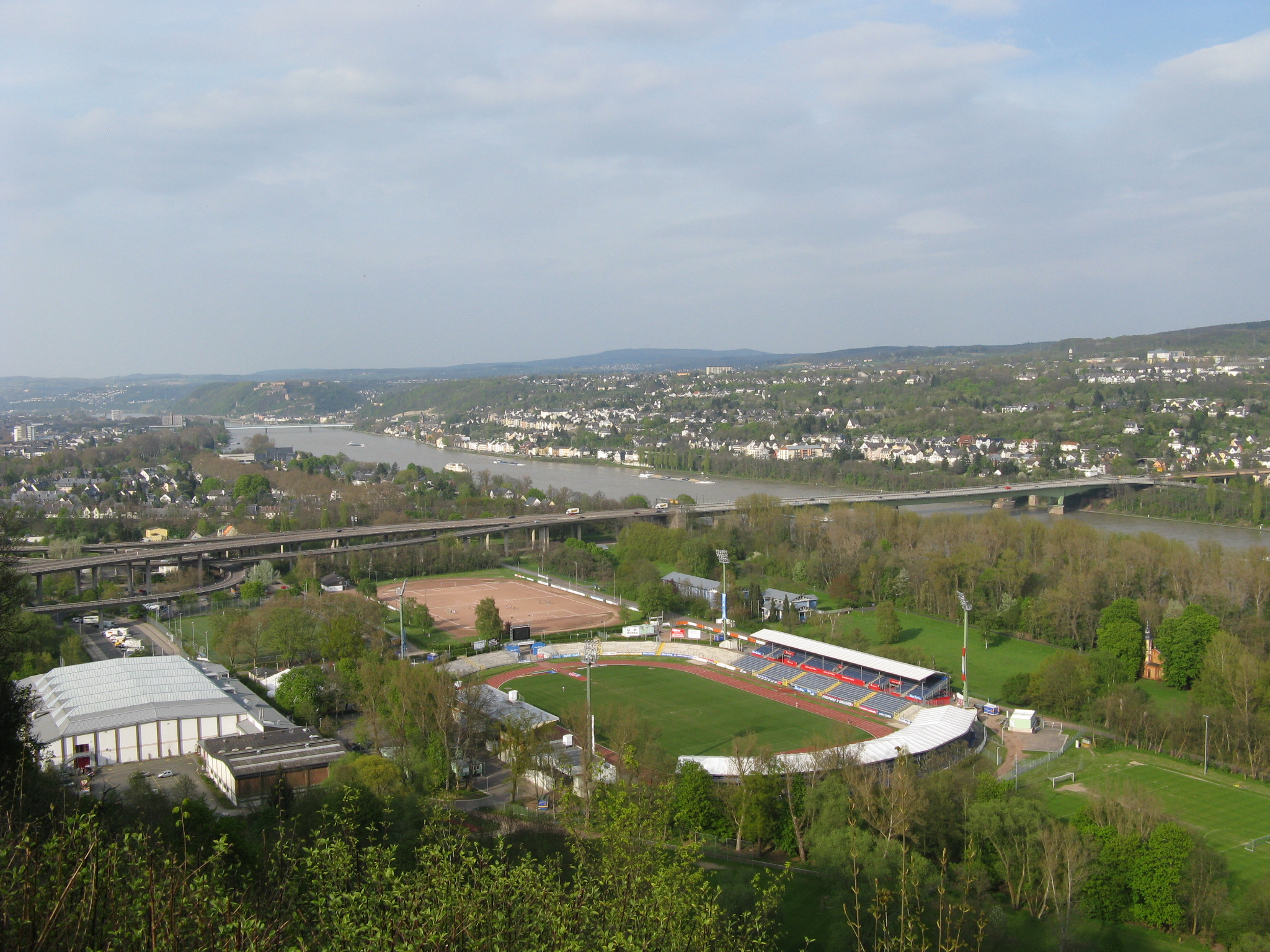 Rittersturz, outlook near Koblenz, Germany